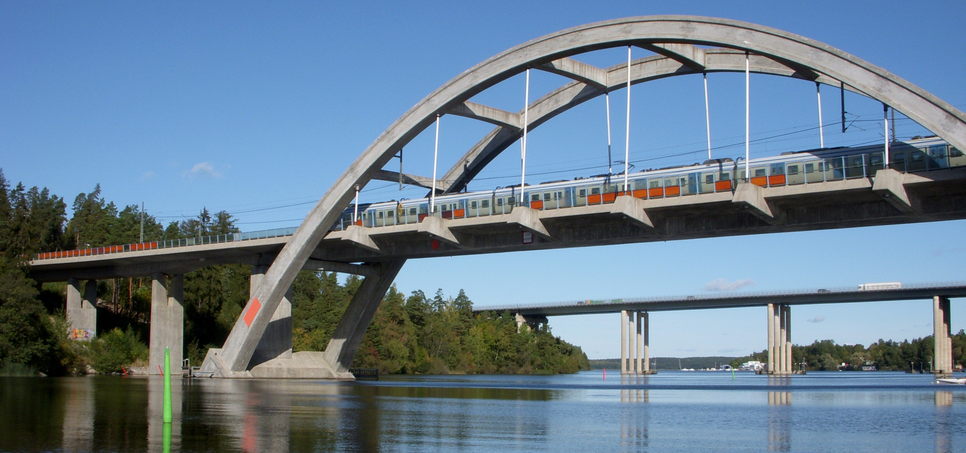 Ett tåg korsar Mälarbanan på Stäketbron. Bilar och en lastbil på andra bron.